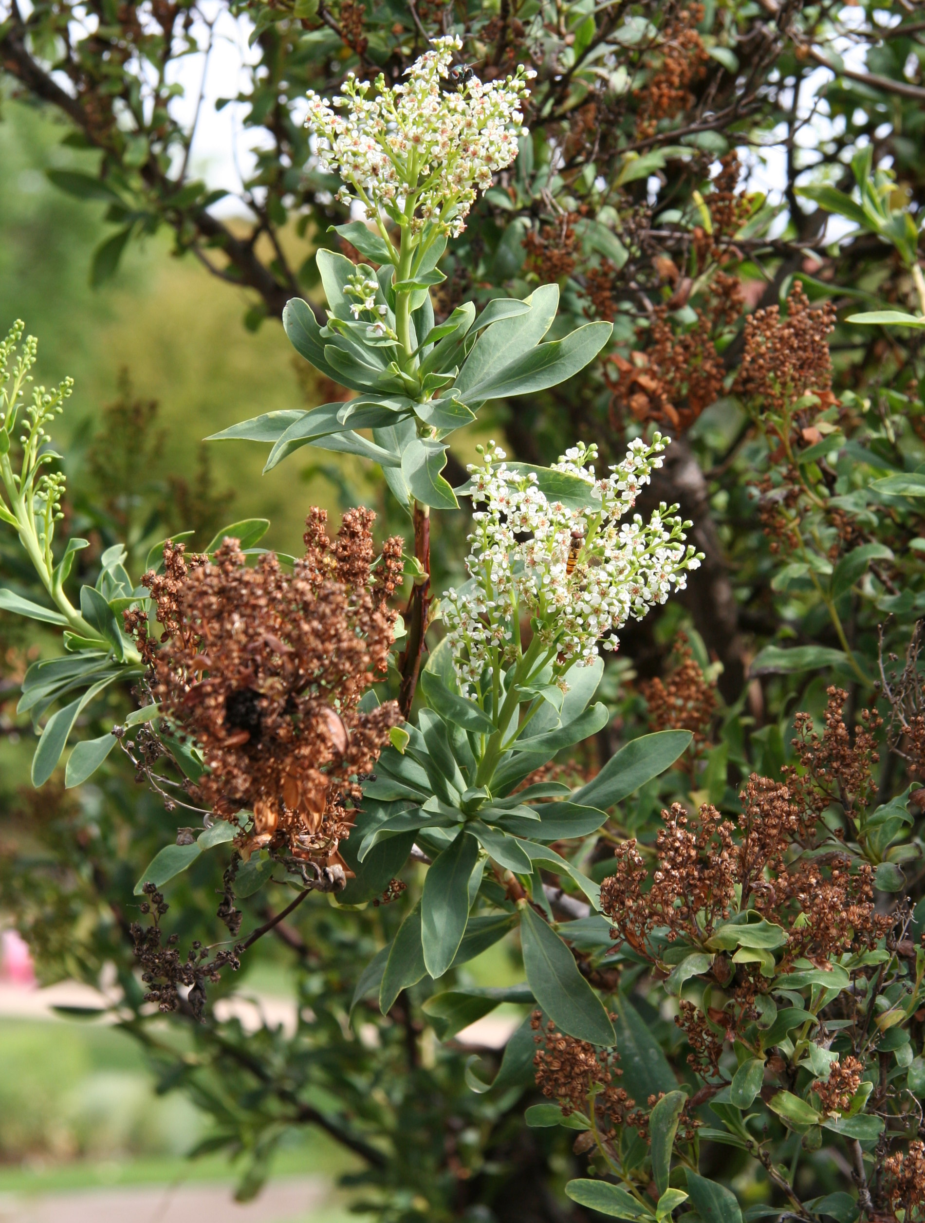 Sibiraea laevigata im Botanischen Garten Kopenhagen